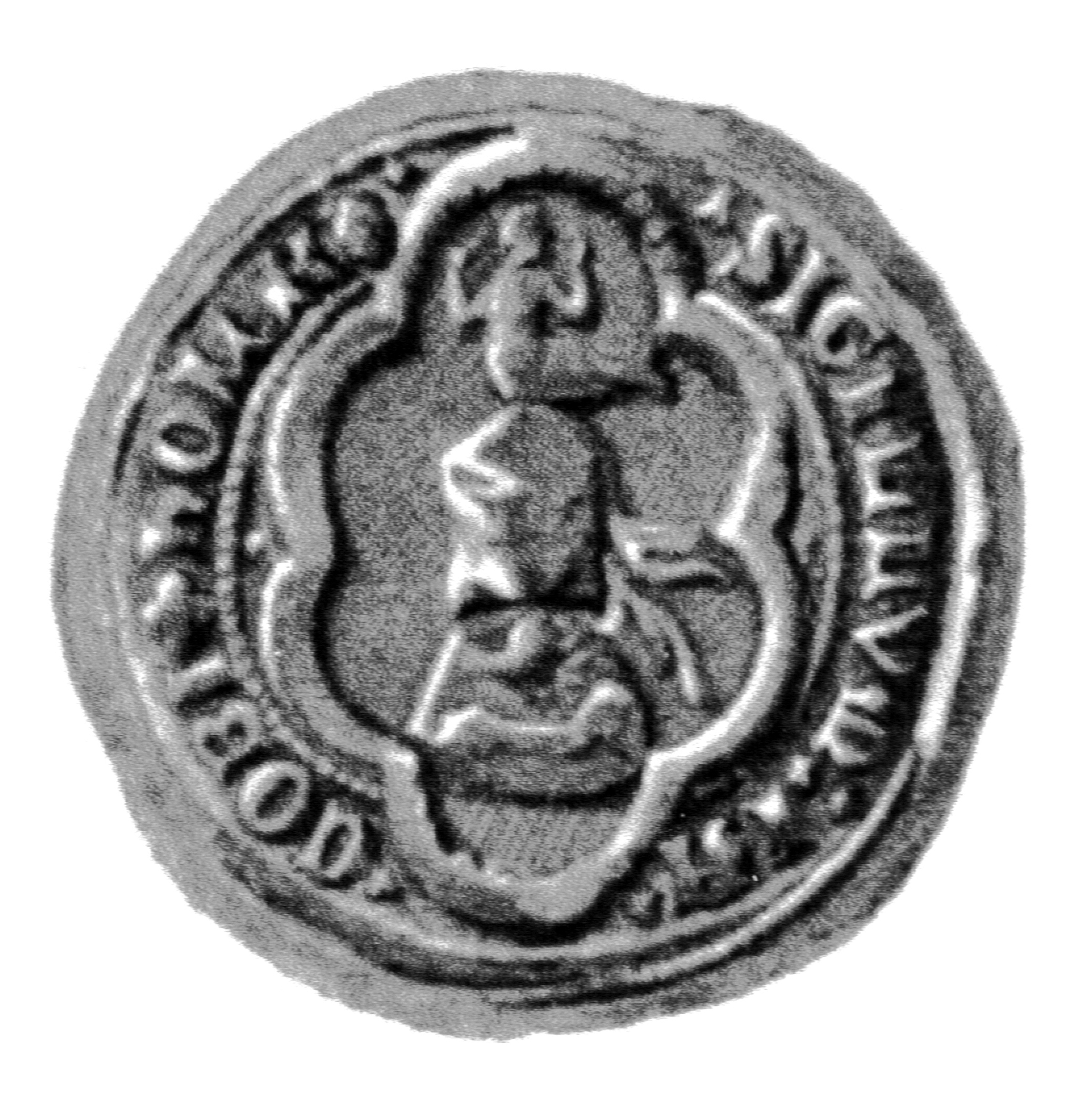 Siegel des Ratsmannes Jacob Holk. Das Siegel stammt aus der Zeit um 1408. Siehe Emil Ferdinand Fehling: Lübeckische Ratslinie, Nr. 423 (Jacob Holk).